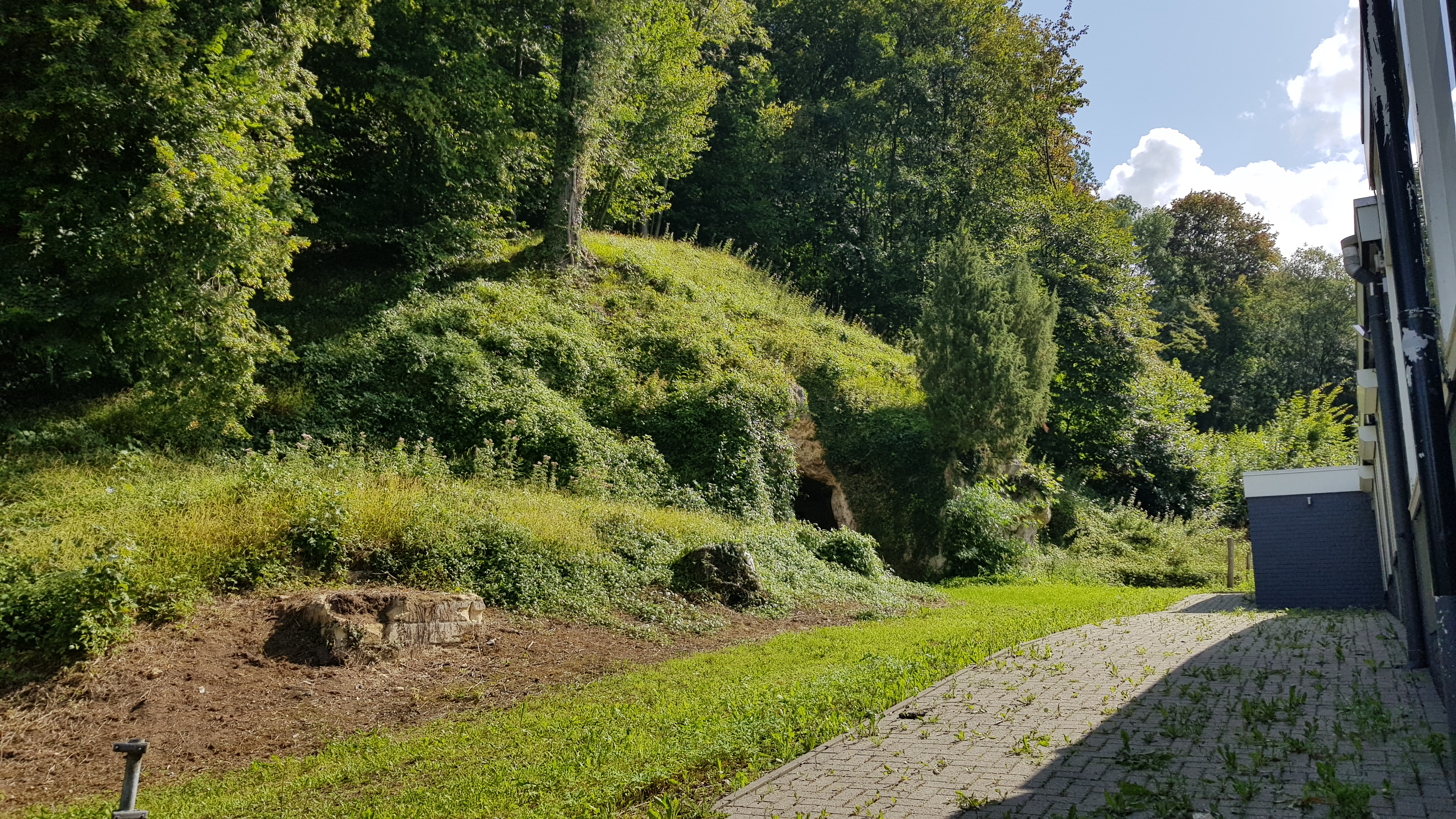 Heidegroeve of Groeve Heide, Geulhem, Nederland